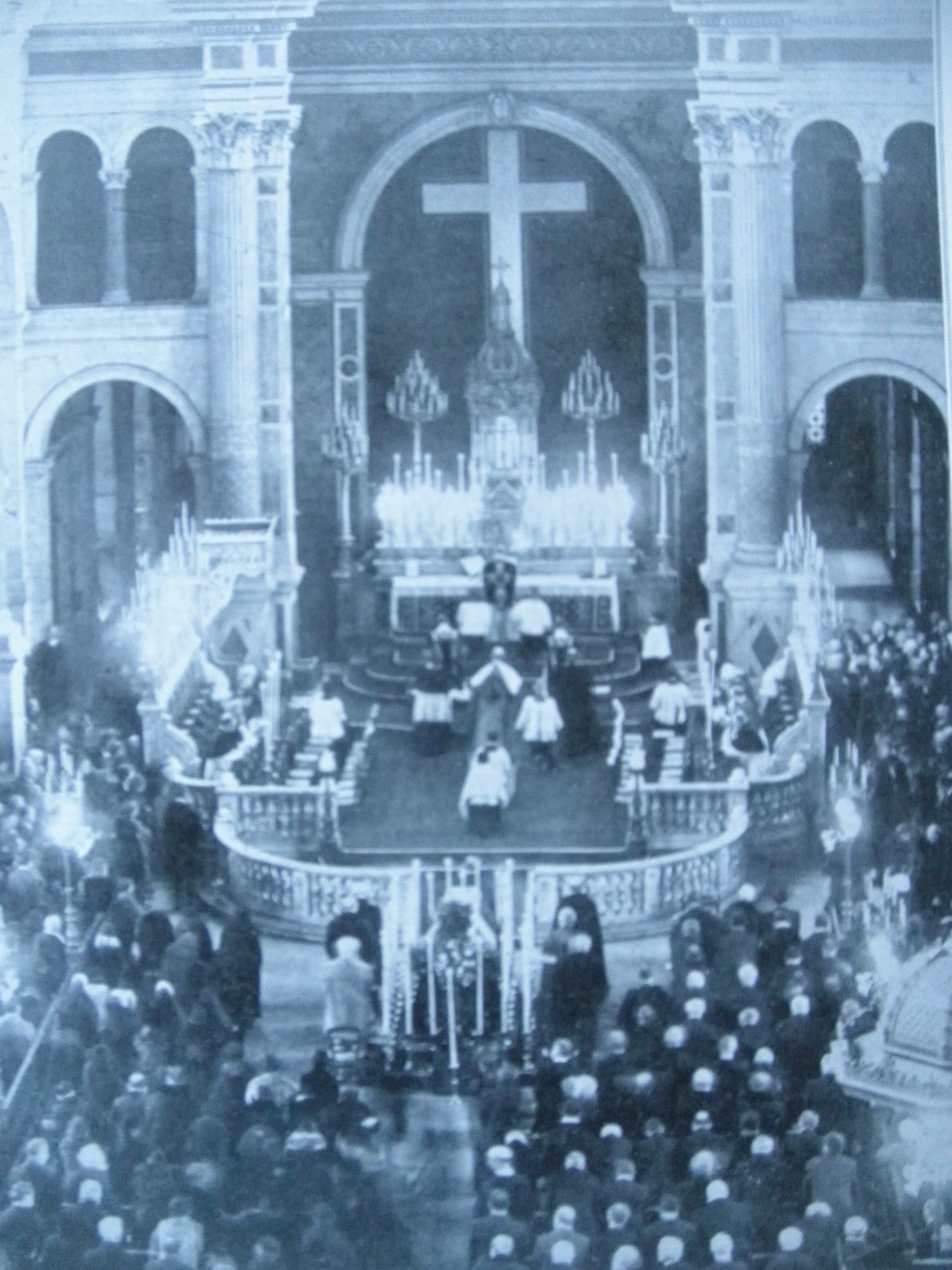 Église Saint-François-Xavier à Paris en 1921.